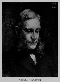 Samuel Scudder